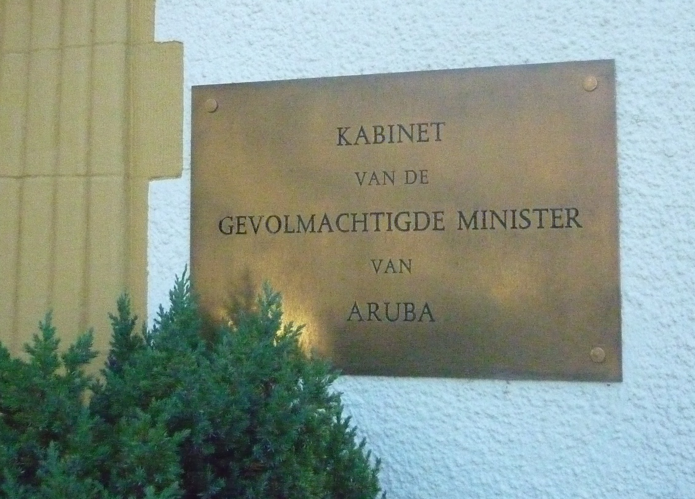 Arubahuis aan de R.J. Schimmelpennicklaan 1 in Den Haag